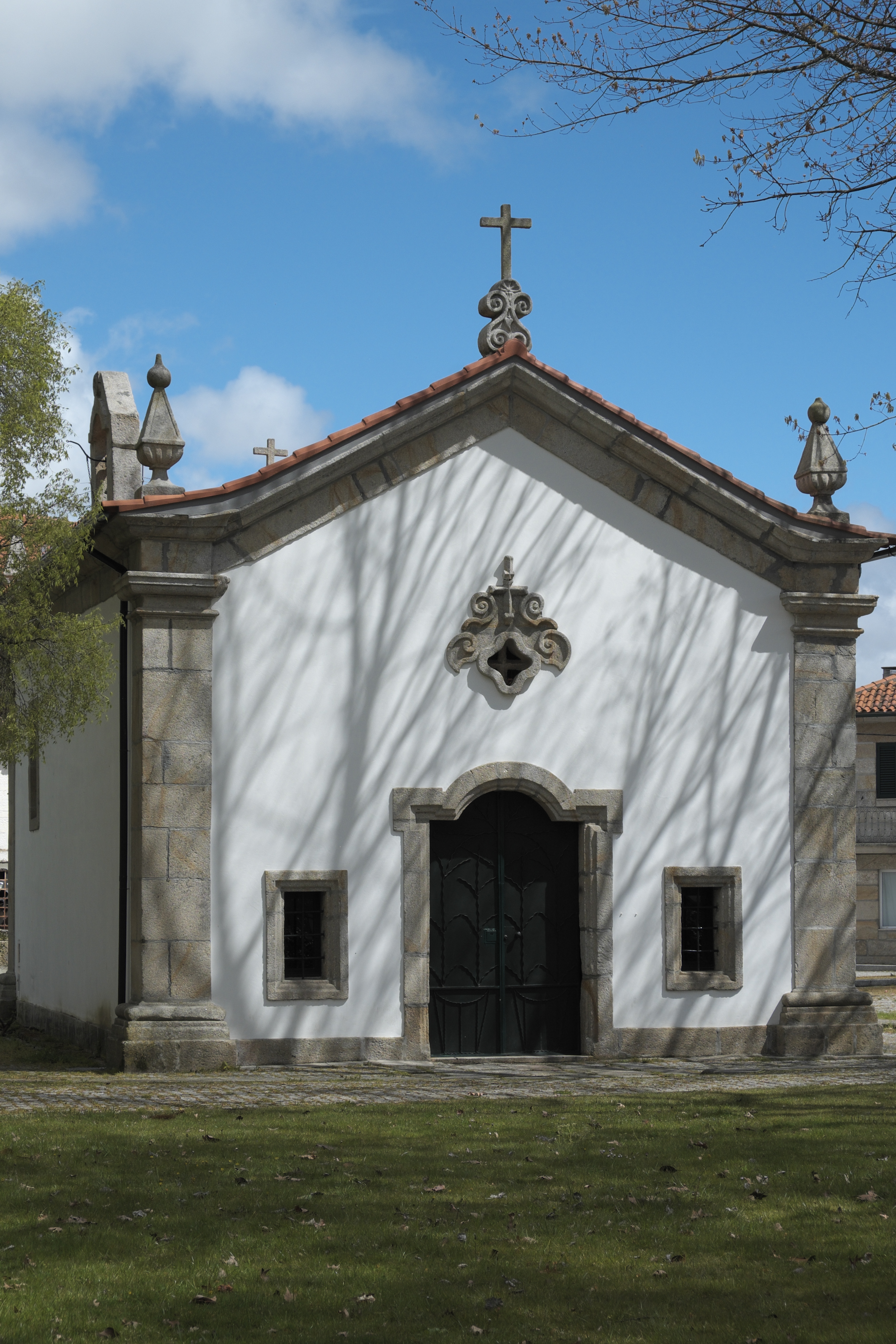 Kapelle in der Freguesia Madalena in Chaves in der Região Norte (Portugal)